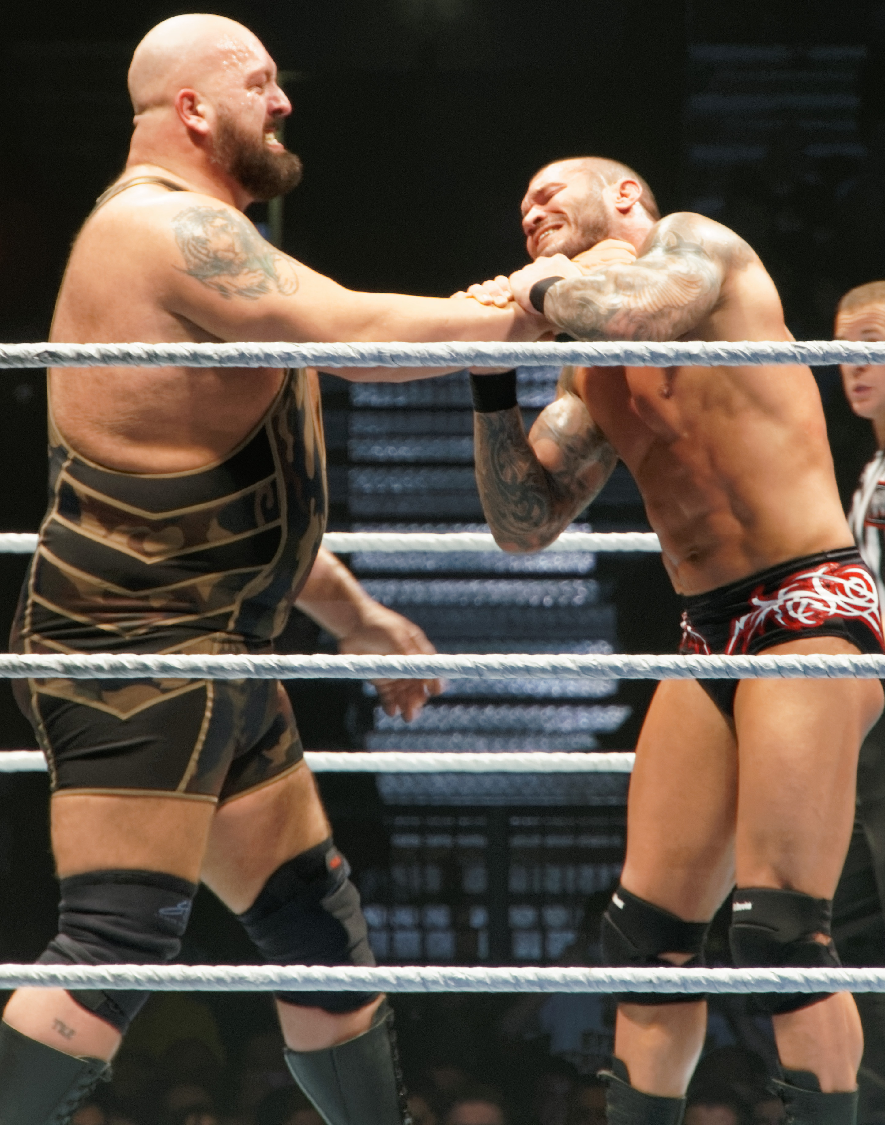 Рэнди Ортон и Биг Шоу на хаус-шоу в ноябре 2013 года